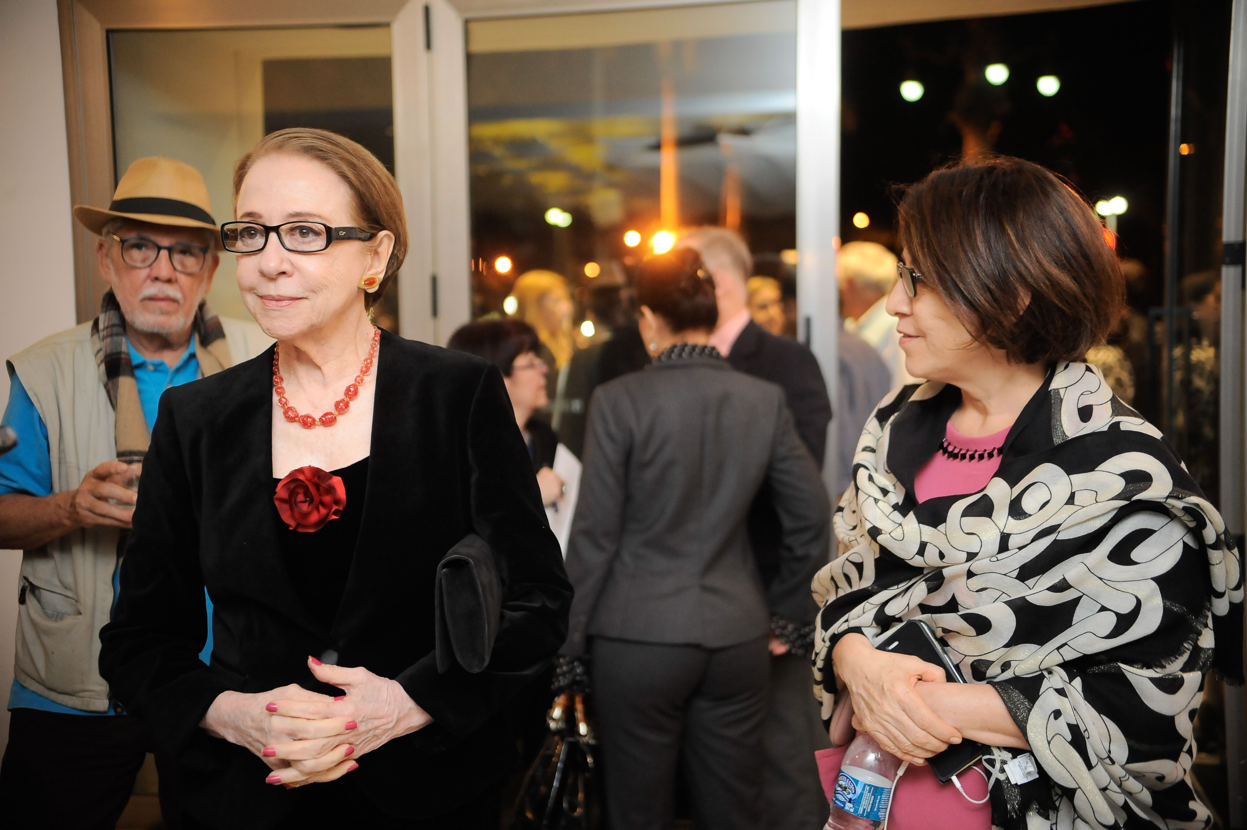 Fernanda Montenegro na cerimônia na Sala Cecília Meireles em comemoração aos 50 anos do Museu da Imagem e do Som (MIS).